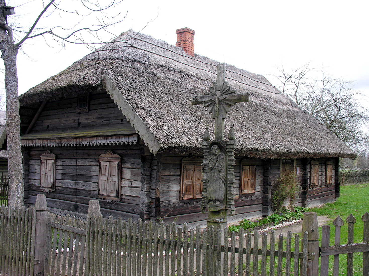 Gryčia past. XIX a. II-oje pusėje, Kėdainių raj. 2007 m. balandžio 21 d., Lietuva